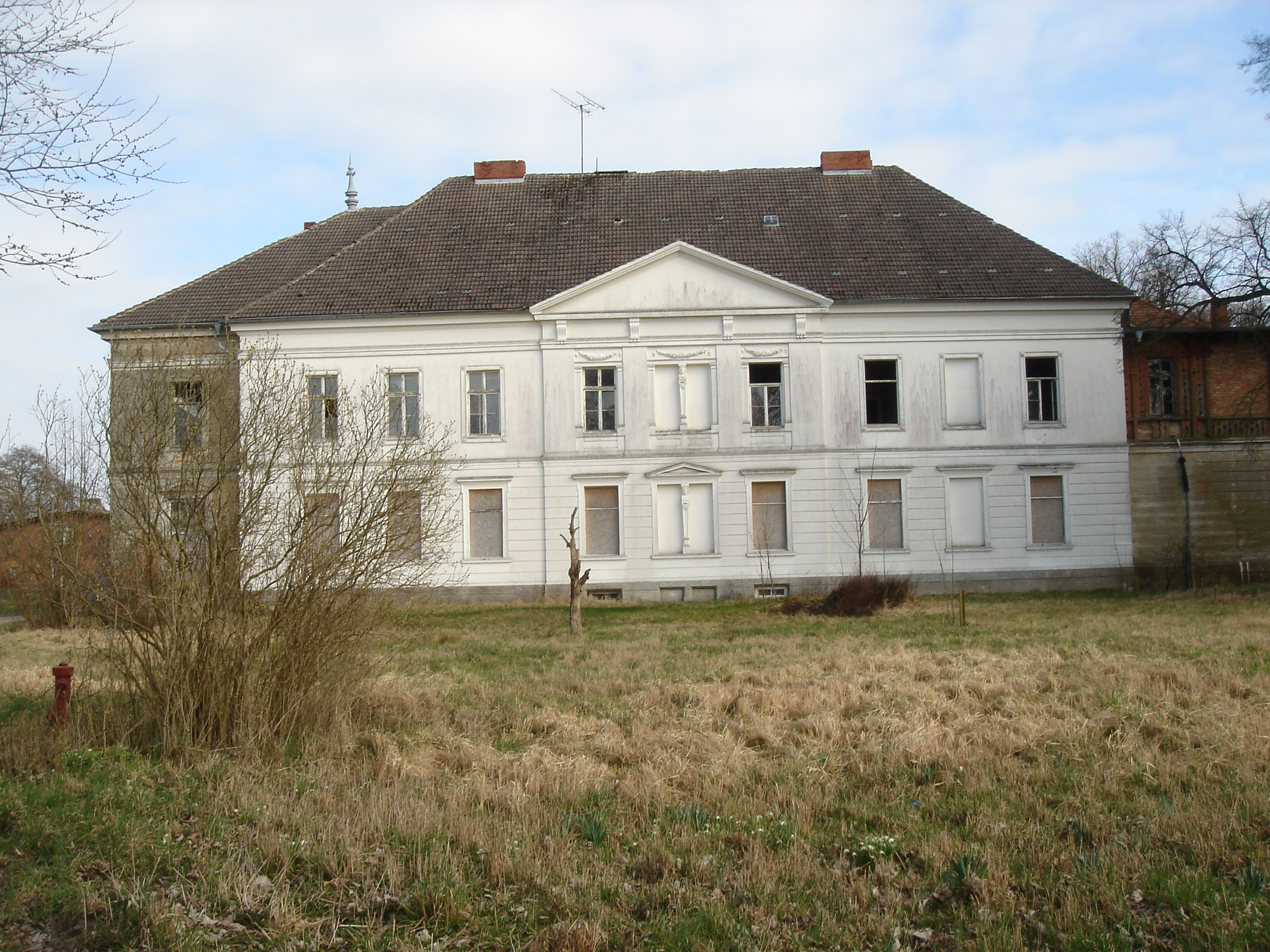 Ruine von Plennin im Jahre 2009